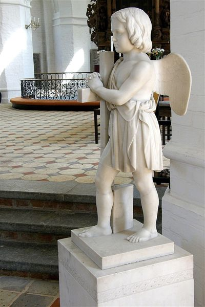 Assens Kirke i Danmark. Engel efter Jerichau